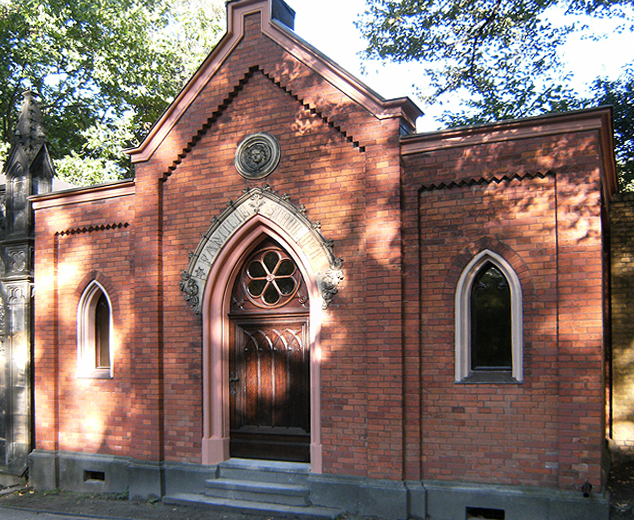 Mausoleum Bethel Henry Strousberg, Alter St.-Matthäus-Kirchhof, Berlin. der "Eisenbahnkönig" des 19. Jhds.Foto Ludger Wekenborg (StMatthaeus). Restaurierung war 2009.